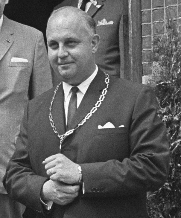 Prins Claus wordt ontvangen door de burgemeester van Yerseke, de heer Cornelis Pijl Hogeweg